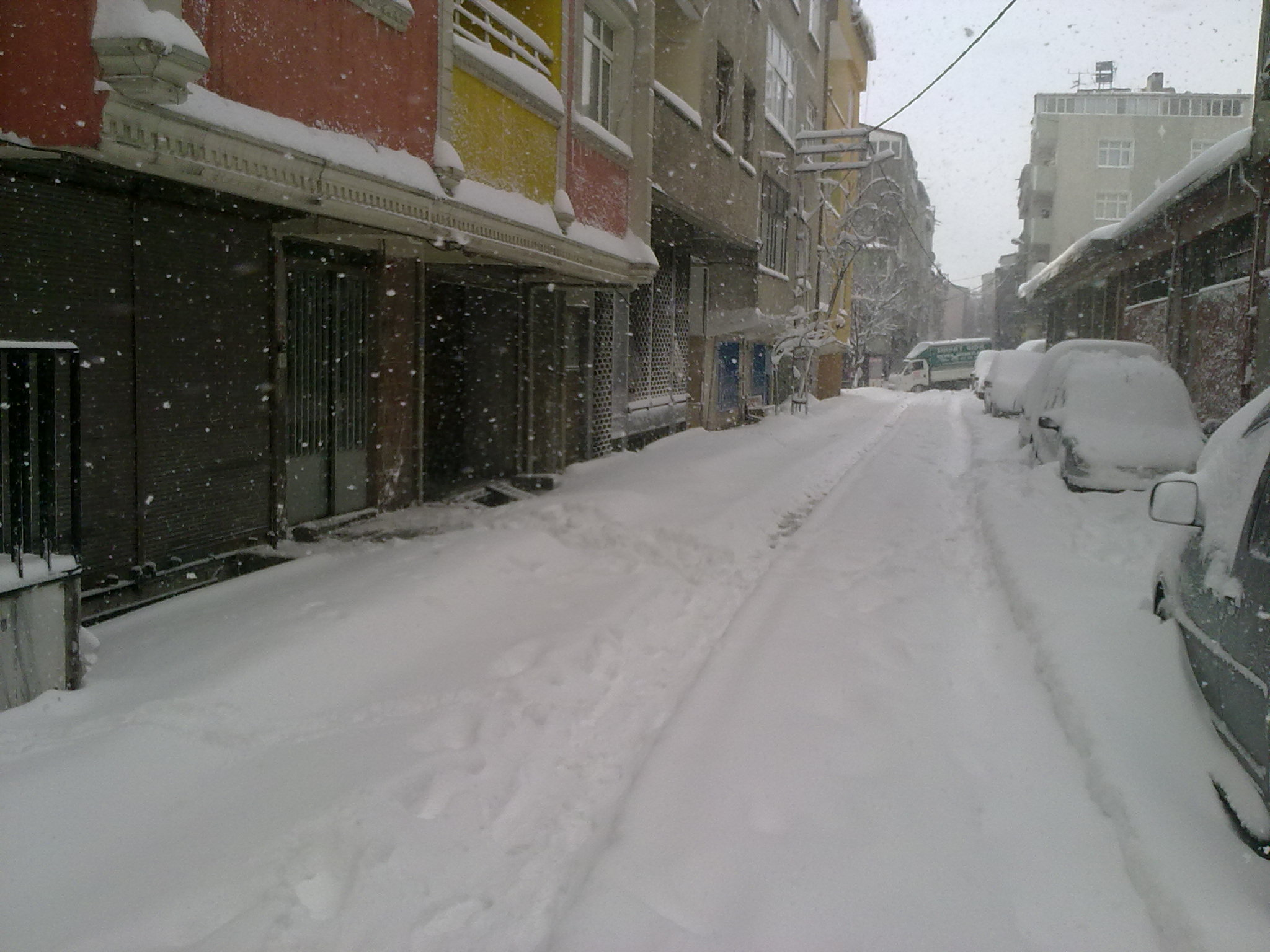 01/02/2012 kışı